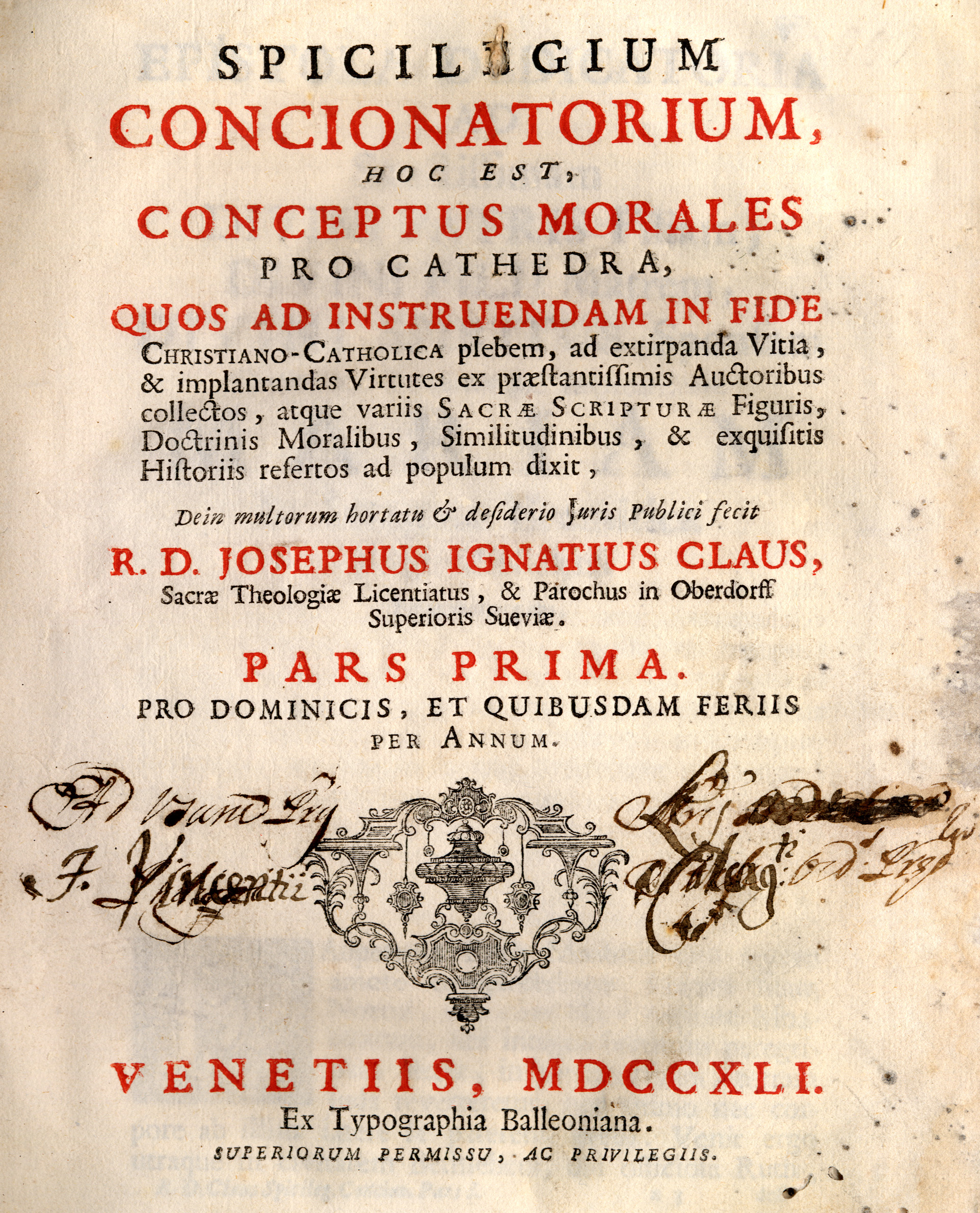 Titelblatt aus u.g. Werk.